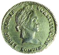 Escudo boliviano un sol de oro (anverso)